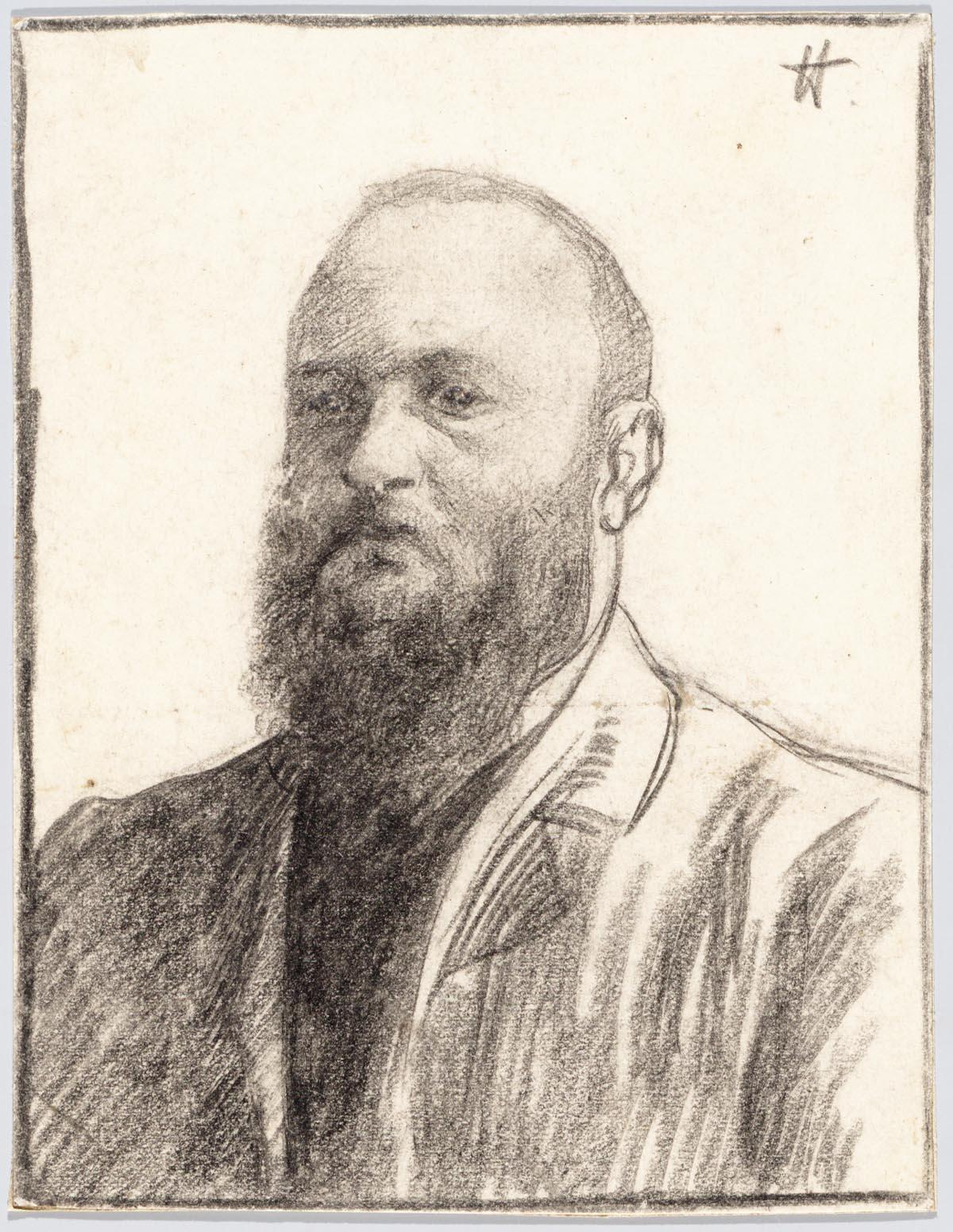 Jan van Zutphen. Geplaatst in: Zondagsblad van Het Volk, 20-11-1904.